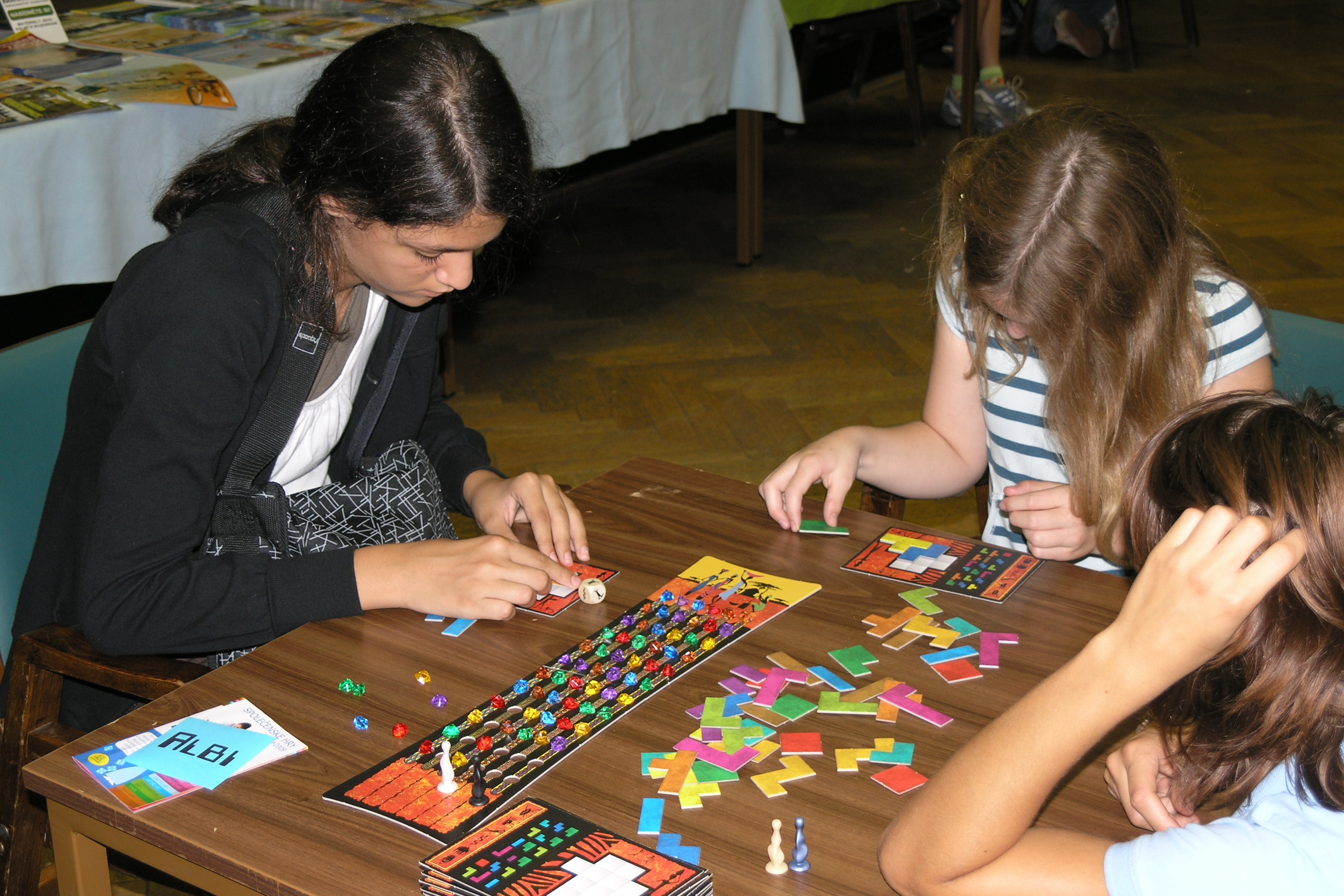 Hry a hlavolamy 2008 - festival her a hlavolamů v Praze, Holešovicích